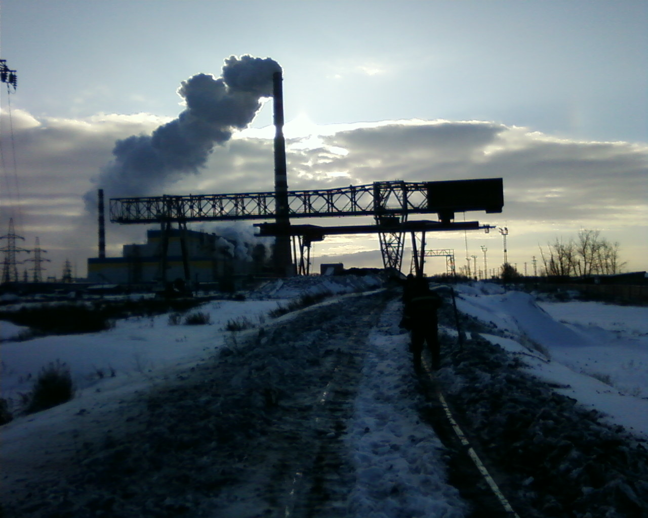 Рудненская ТЭЦ